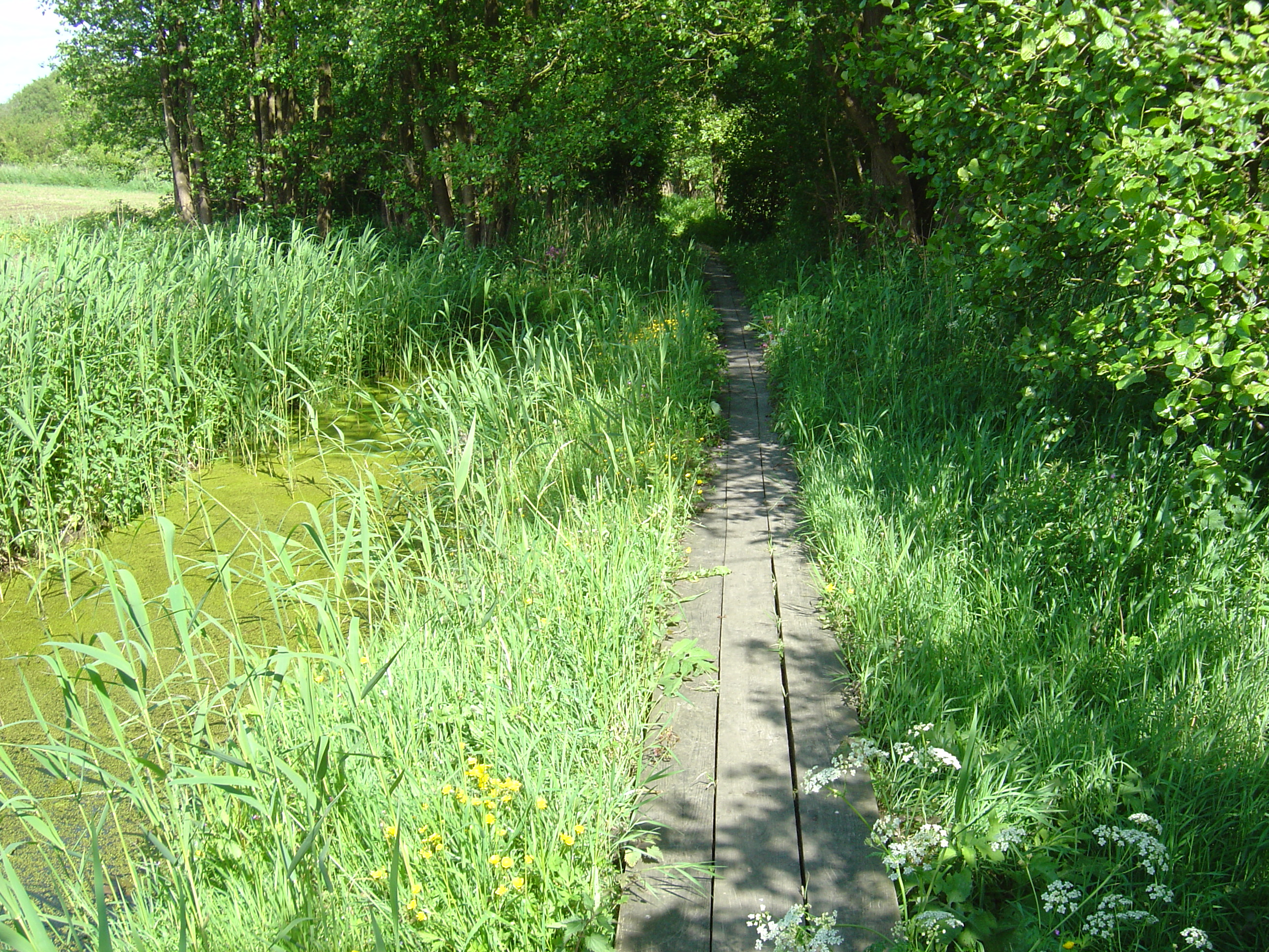 Habernisser Moor/Niederung: Über Bohlenwege und durch Wälder führt der Rundweg (ca. 2 Stunden) durch die Niederung